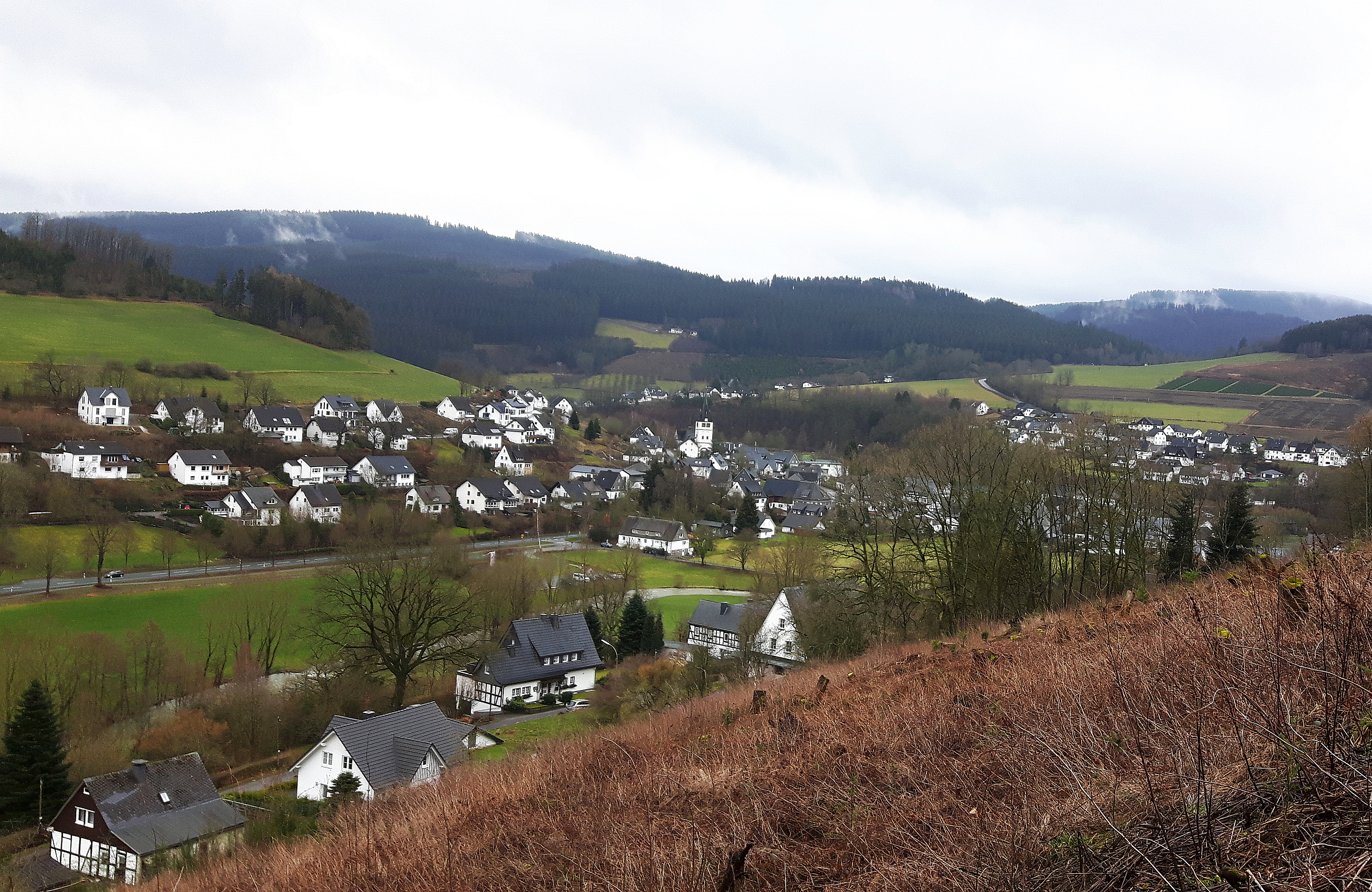 Fleckenberg, 2019, Blick auf die Ortsmitte und die B 236